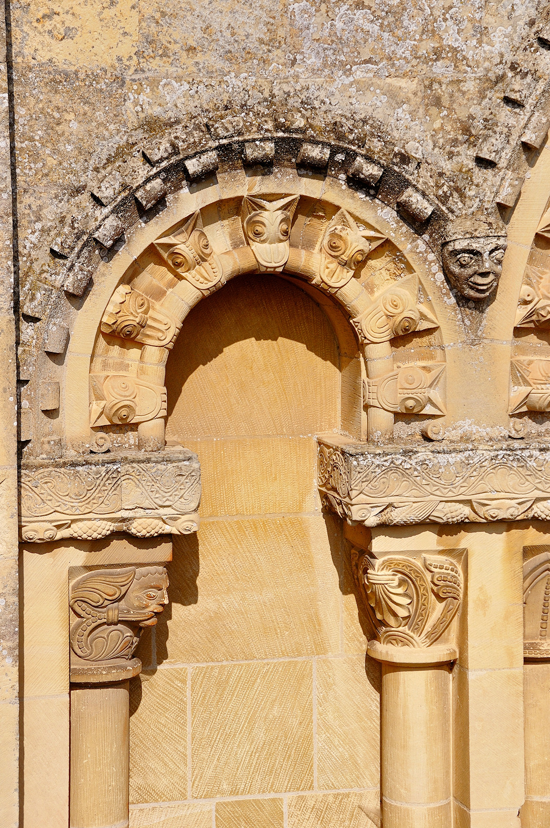 Beakheads sur une arcature de l'église Saint-Ouen de Rots